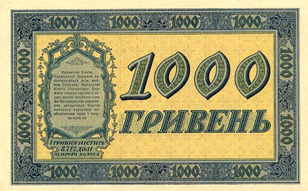 1000 гривен Украинской Державы 1918 года. Реверс